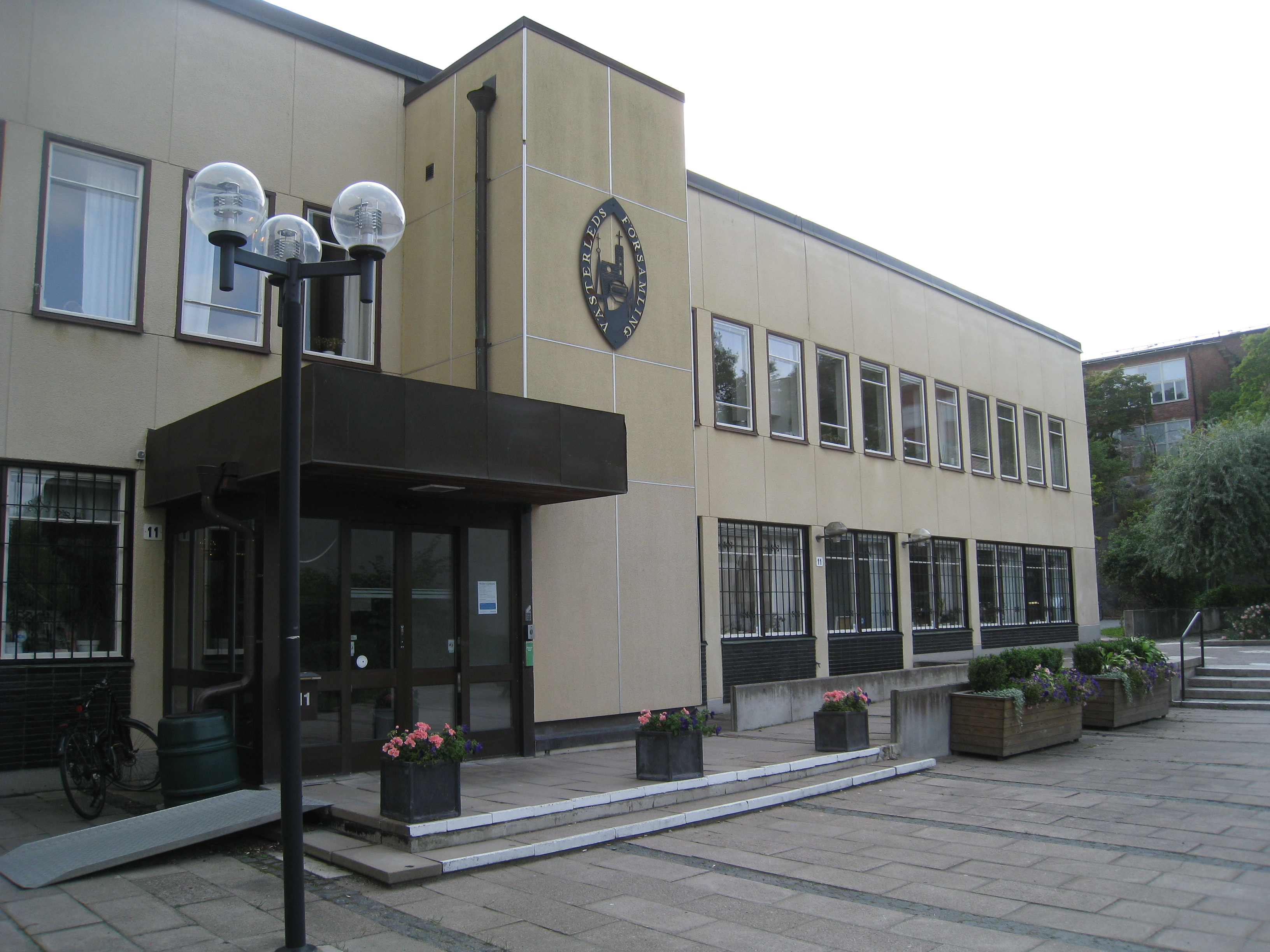 Västerleds församlingshus, Vidängsvägen 11 i Alvik, Bromma, western Stockholm. Sankt Ansgars kyrka ligger i anslutning till församlingslokalerna.